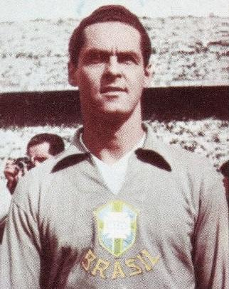 Gilmar en 1965 - Campioni dello Sport 1966-1967, n°81